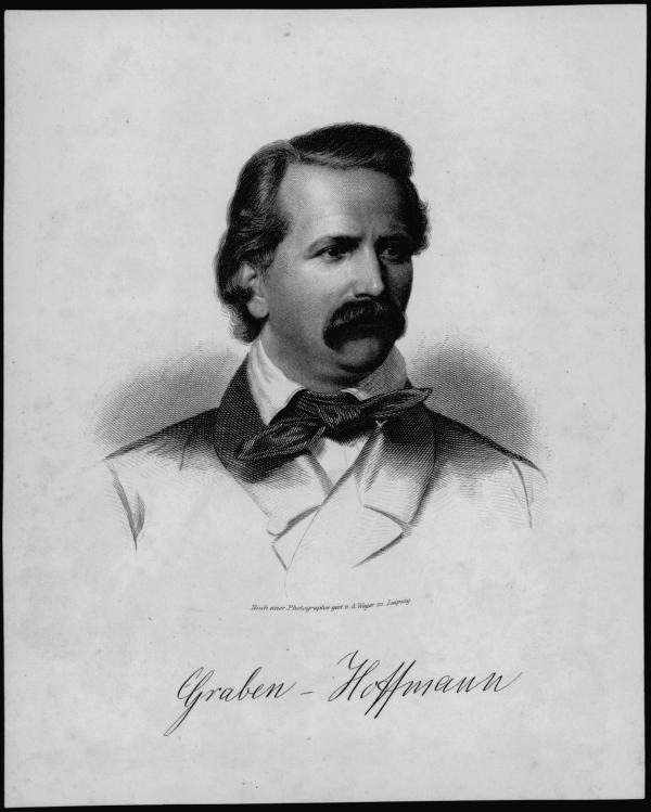 Gustav Graben-Hoffmann (1820-1900), gestochen von August Weger (1823-1892)